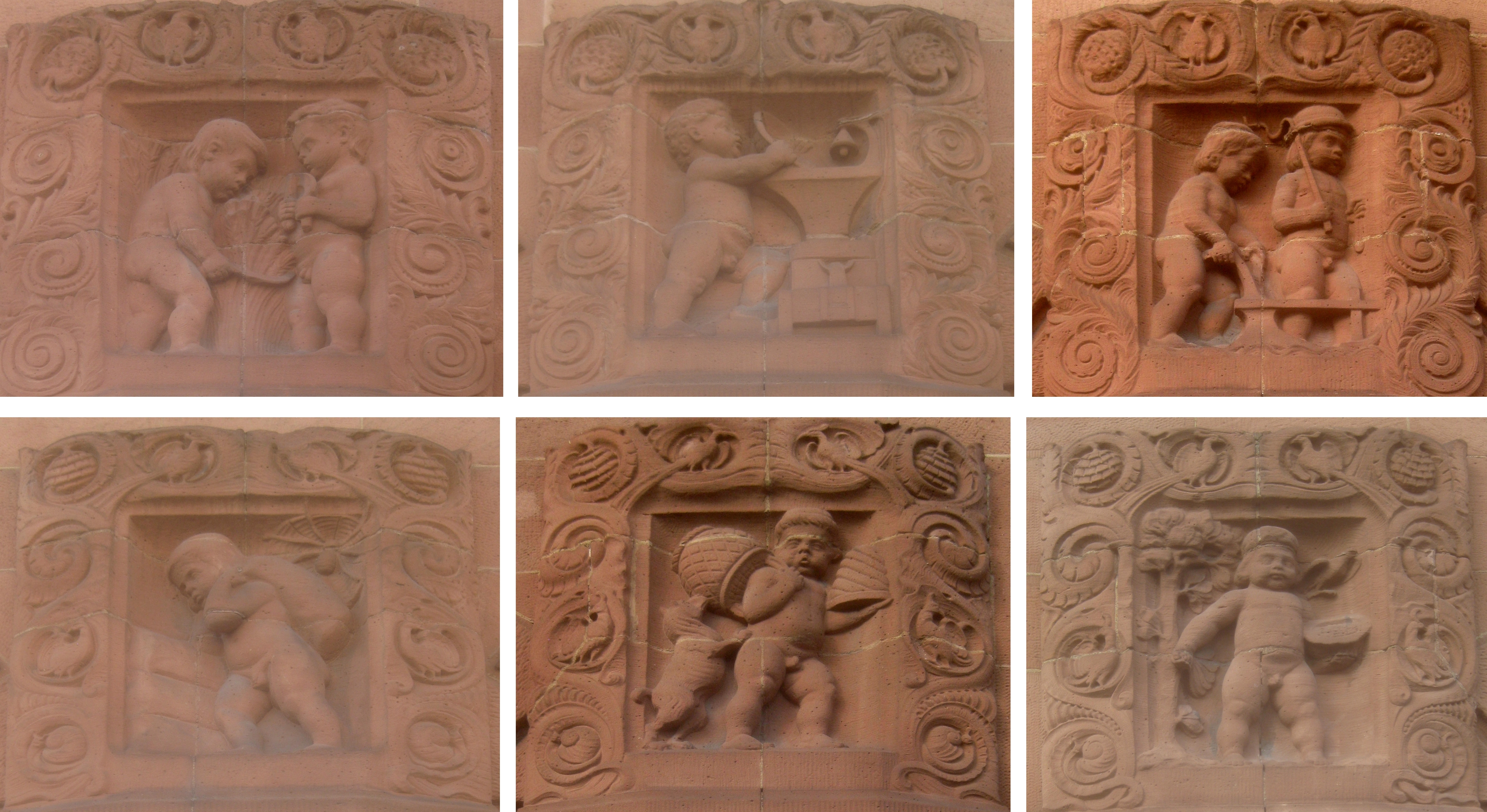 Sechs der sieben Puttenreliefs mit Genreszenen als Abschluss der Blendpfeiler zwischen den Fenstern im Erdgeschoss des Wohn- und Geschäftshauses in der Silberburgstraße 74 in Stuttgart.